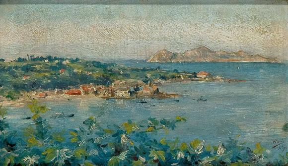 Ceferino Araujo Sánchez (1824-1897): Pintor y grabador cántabro que además escribió dos interesantes tratados de temprana crítica museística sobre el Prado (uno de ellos dentro de su ópera máxima: Los museos de España publicada en 1875); también fue autor de monografías sobre Goya y Palmaroli, y de numerosas colaboraciones en las mejores revistas artísticas de la época.